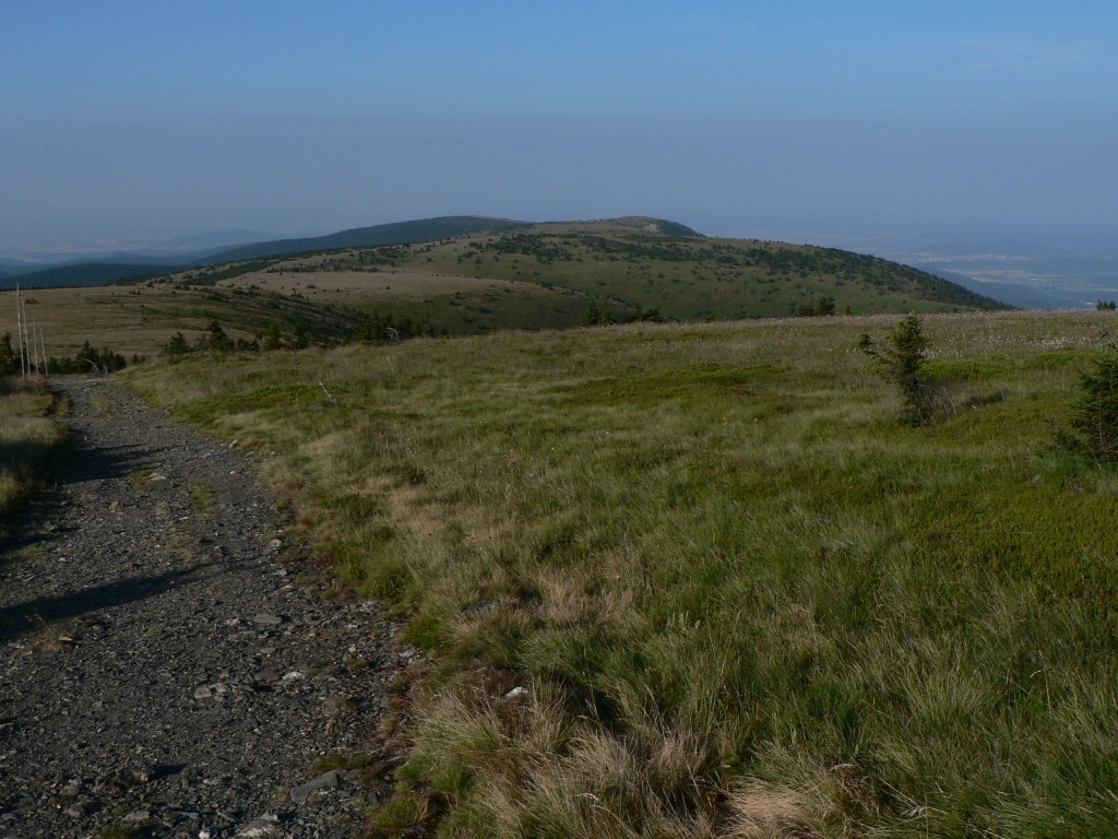 Holní porosty na hřebeni Hrubého Jeseníku, pohled z Vysoké Hole k jihu na Velký Máj, Jelení hřbet a Břidličnou.